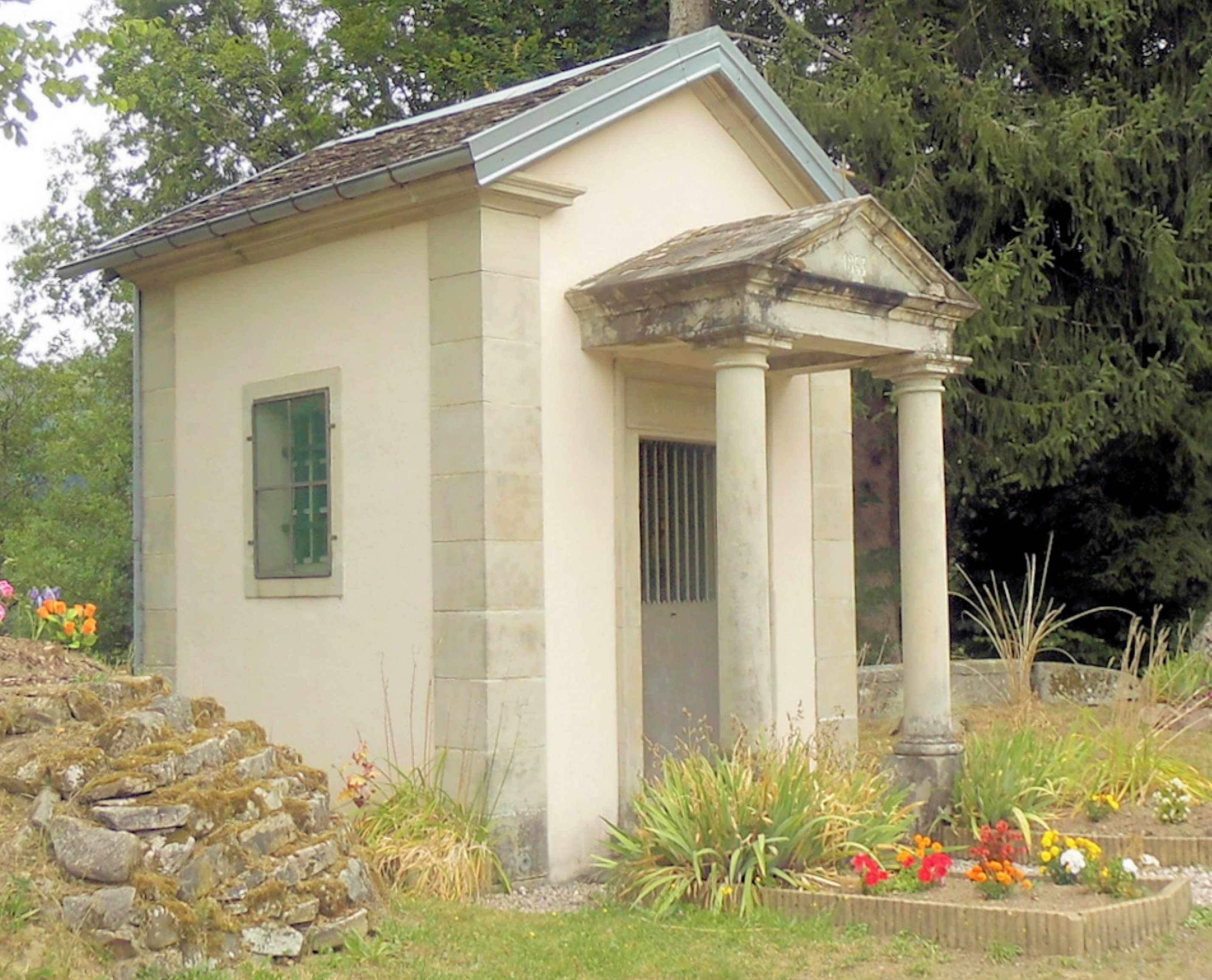 La chapelle de la Basse Robert, commune de Fougerolles